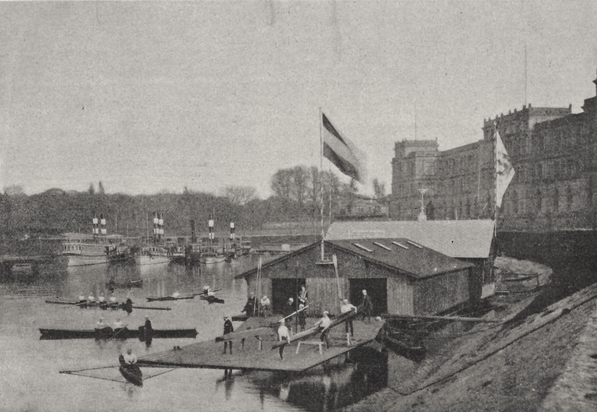 Blick auf den Sicherheitshafen an der Kgl. Kunstakademie mit dem "Düsseldorfer Ruderverein 1880", Foto vor 1897